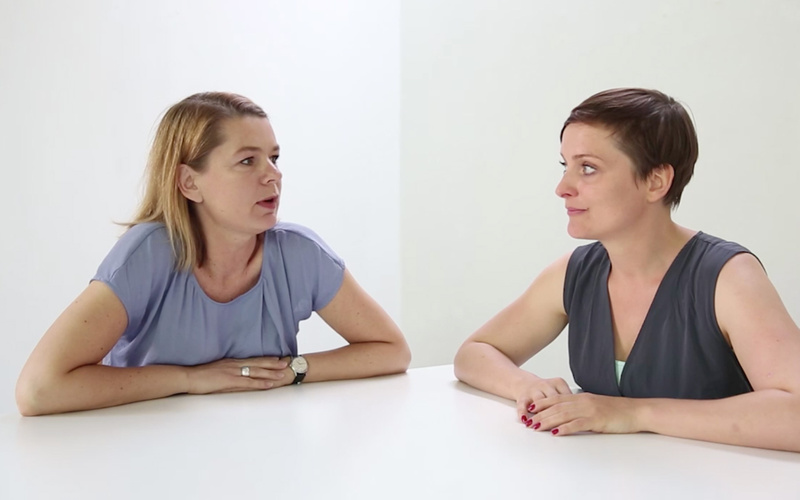 Dr. Anne Schloen, Kunsthistorikerin, und Stefanie Klingemann, Künstlerin